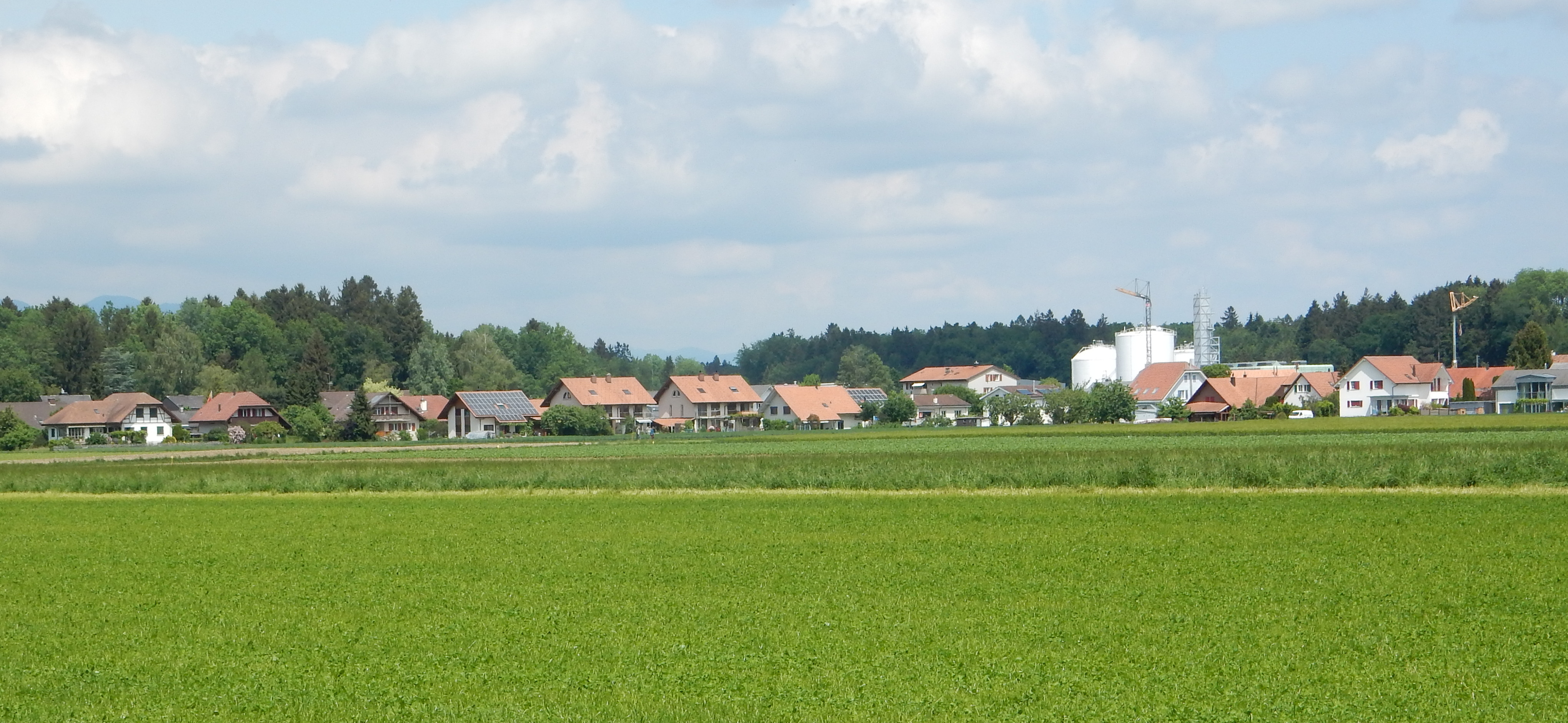 Wiler bei Utzenstorf (Kanton Bern / Schweiz)